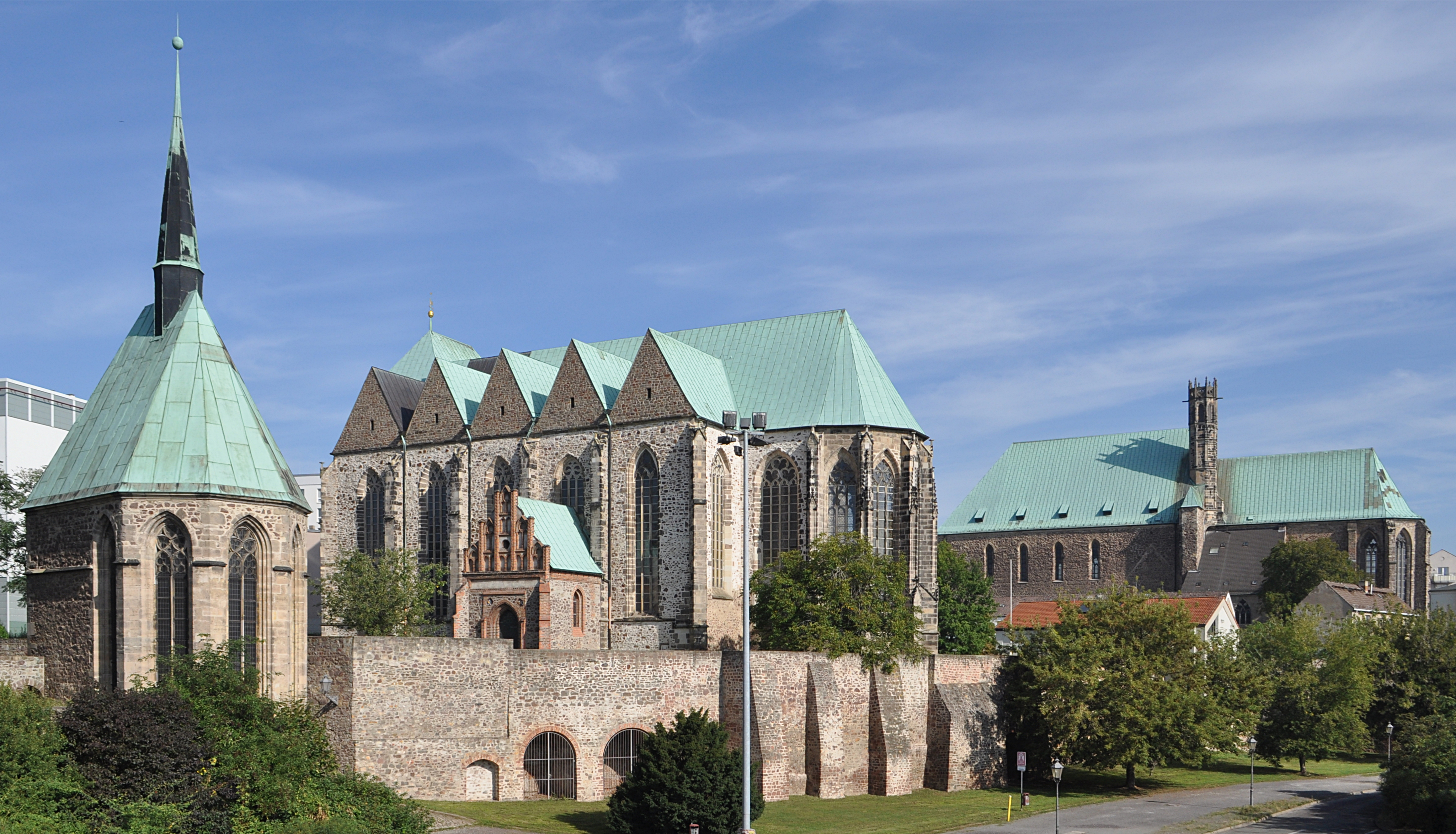 Magdalenenkapelle in Magdeburg-Altstadt, im Hintergrund die St. Petri und die Wallonerkirche. This is a photograph of an architectural monument.It is on the list of cultural monuments of Magdeburg